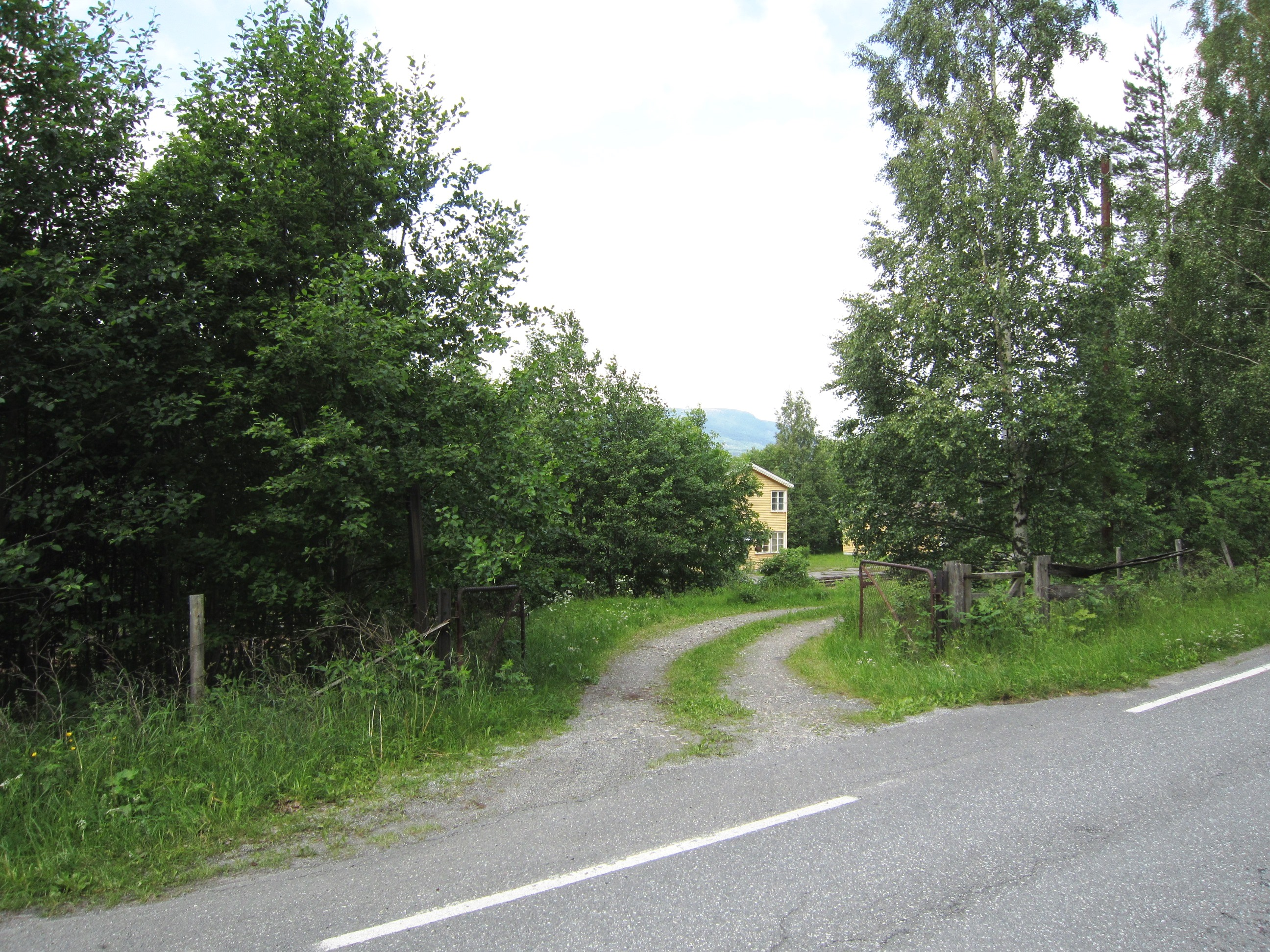 Fylkesvei 1600 (tidl. 229) gikk forbi Strandlykkja stasjon.